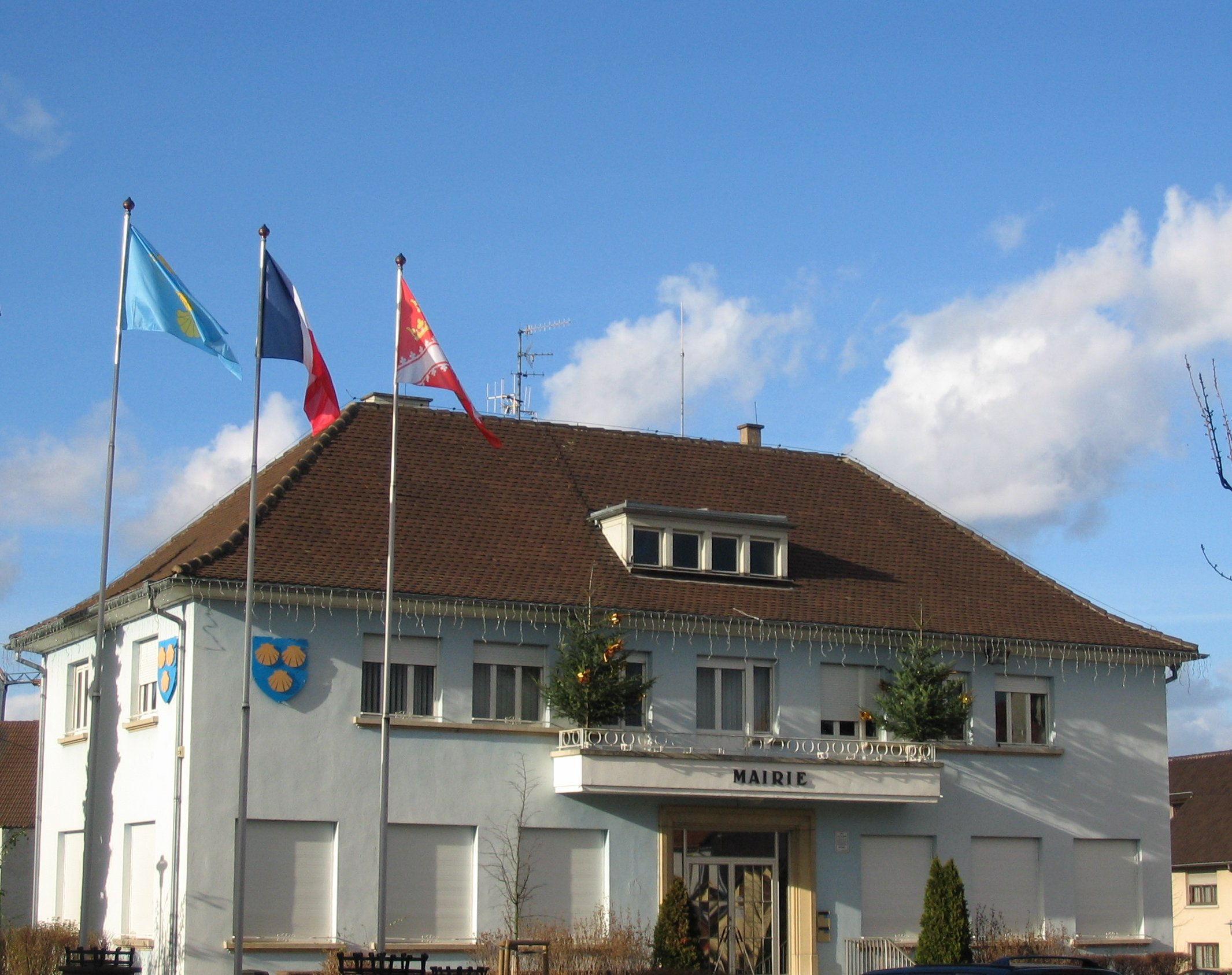 Mairie d'Oberhausbergen dans la banlieue ouest de Strasbourg